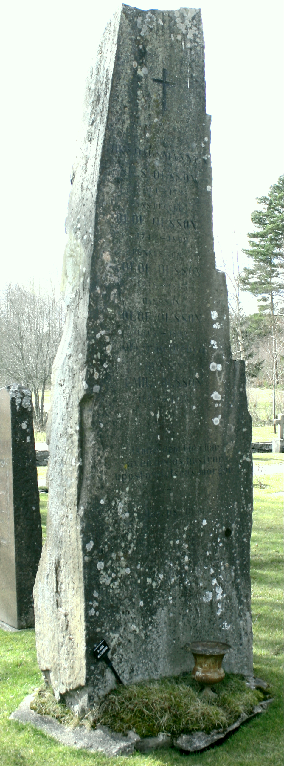 Riksdagsmannastenen på Ny kyrkogård. Minnesmärke över riksdagsmän från socknen mellan 1771 och 1899.